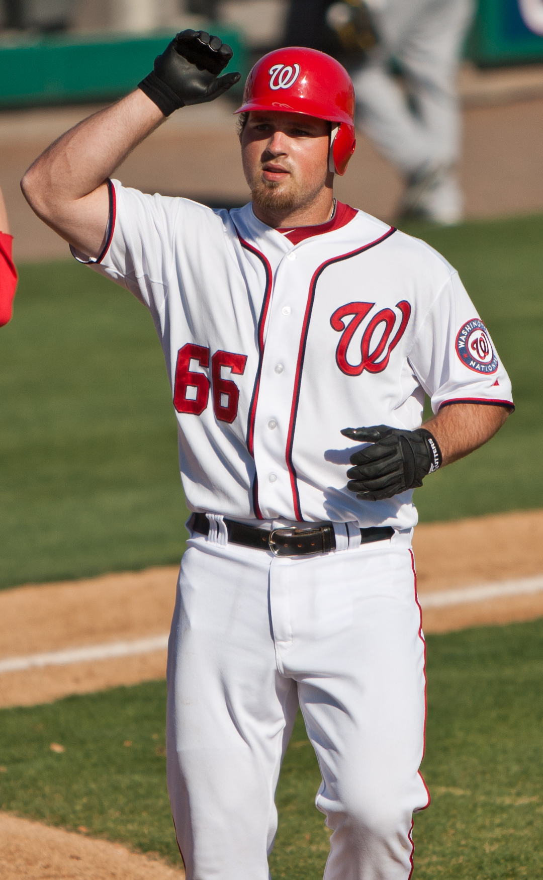 Derek Norris